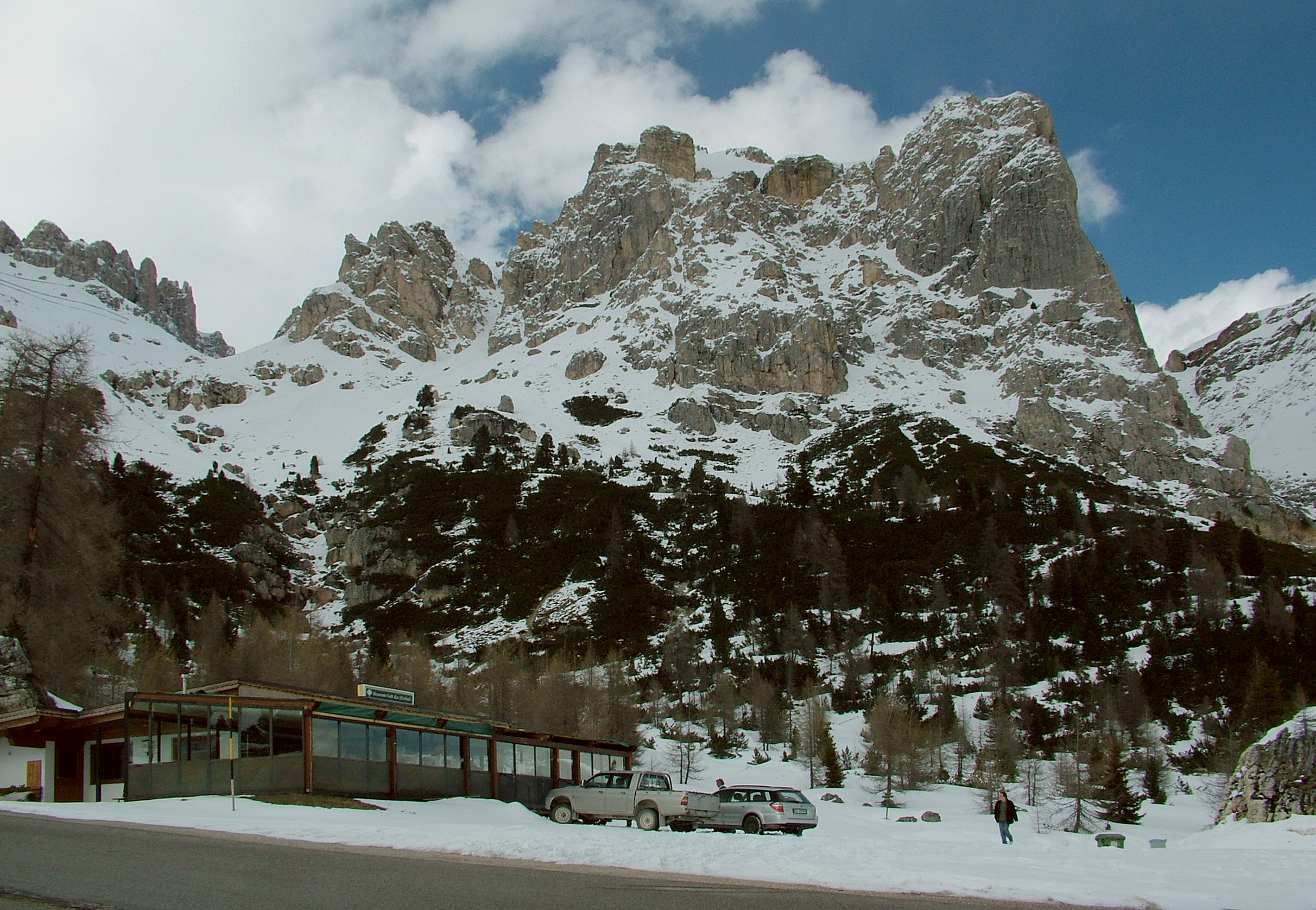 Falzarego-hágó, Olaszország